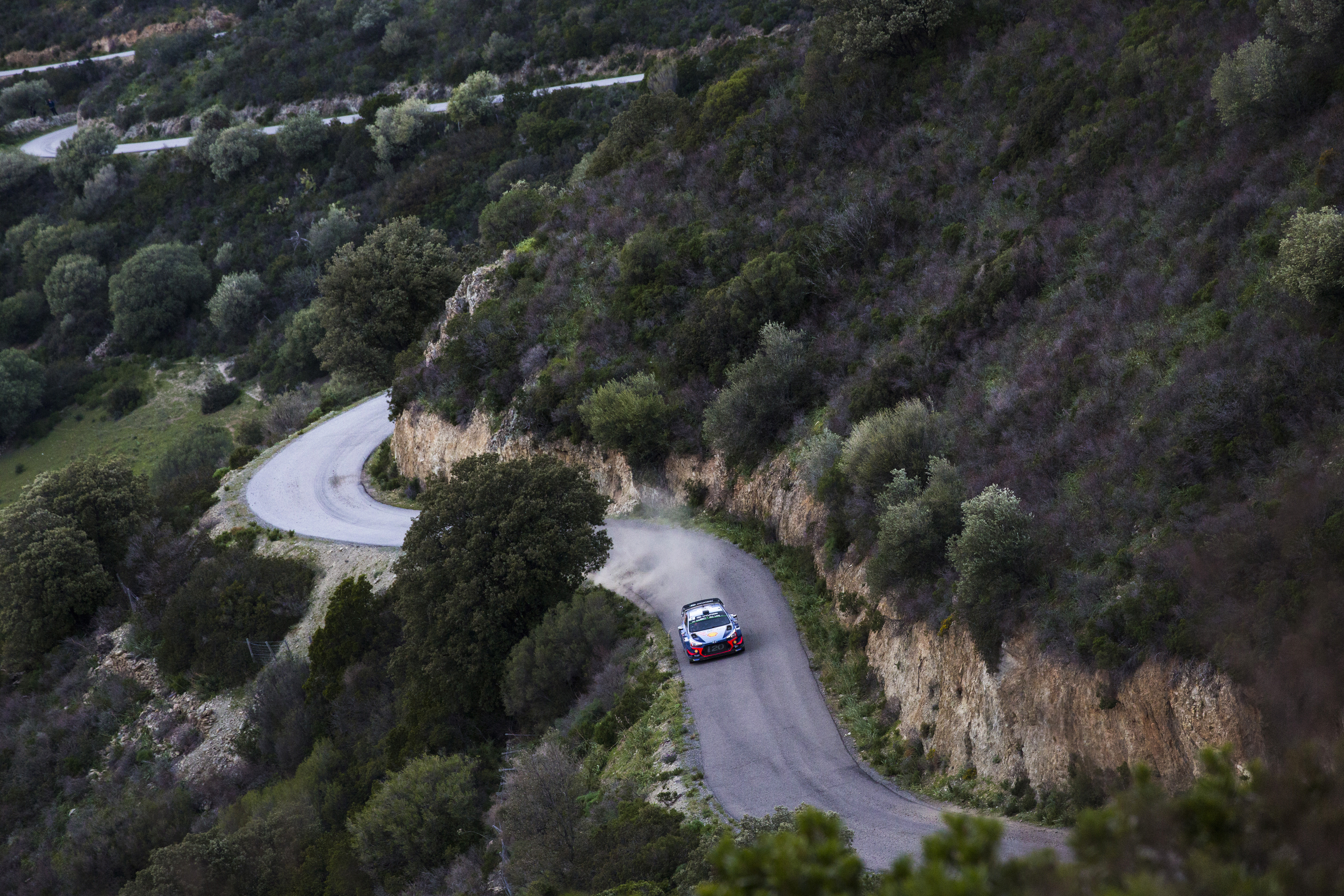 Rajd Korsyki 2018 Thierry Neuville i Nicolas Gilsoul prowadzący Hyundaia i20 Coupe WRC